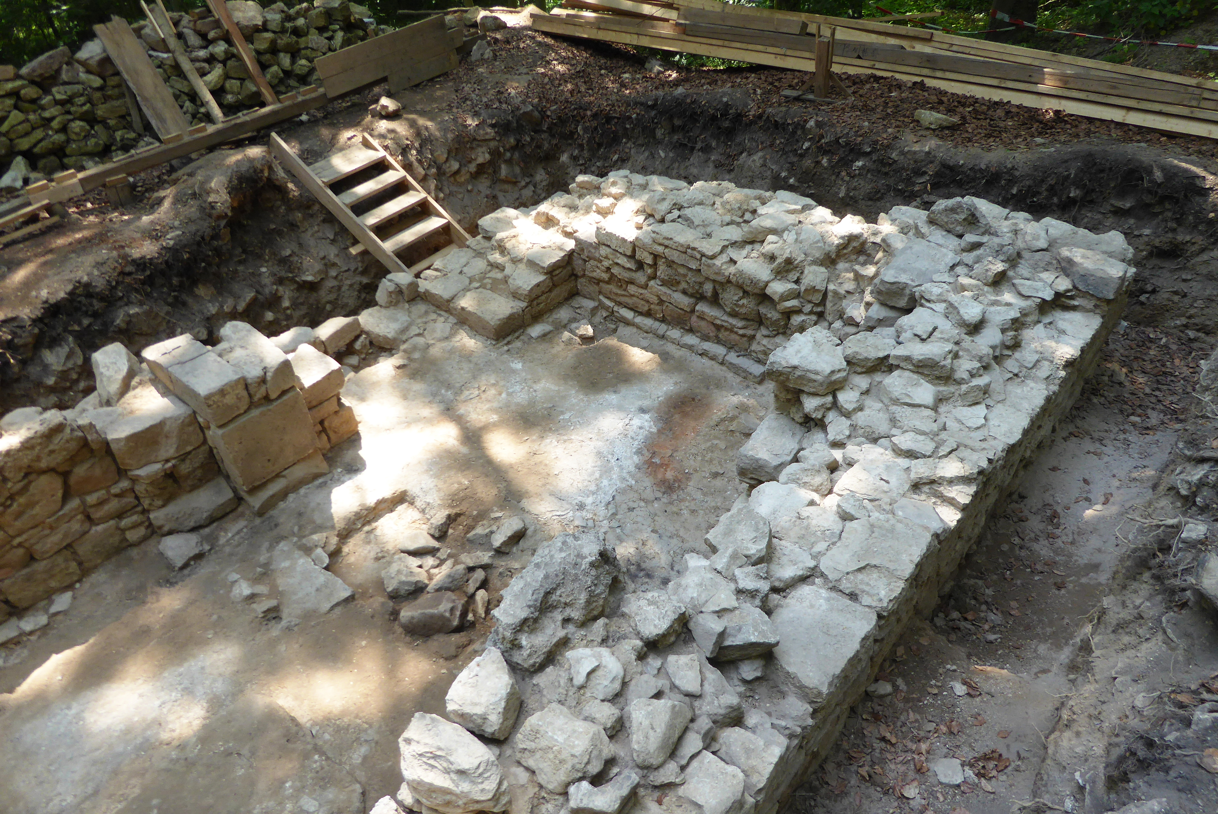 Archäologische Grabung an einer Kirchenruine nahe Asche, Stadt Hardegsen, Südniedersachsen. Blick von Nordosten auf die Mauerreste des ehemaligen Turms